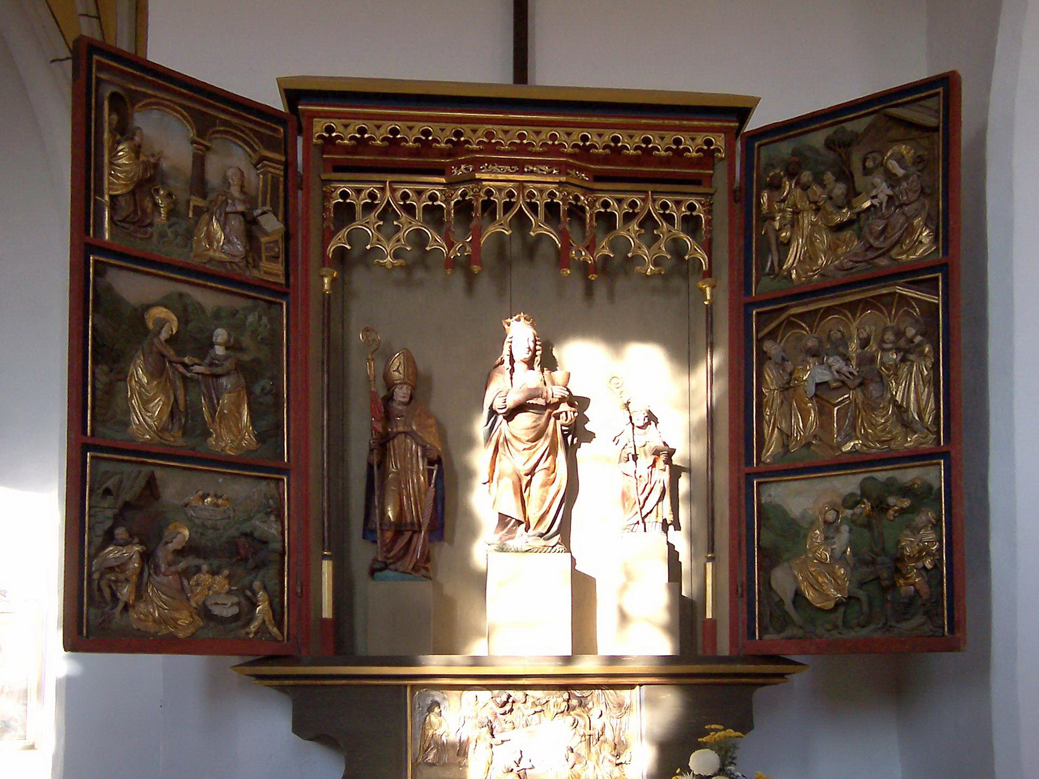 Landshut, Frauenberg 14. Katholische Kirche St. Mariä Heimsuchung. Modern gotischer Flügelaltar mit spätgotischen Altarflügeln. Auf den Flügeln je drei Reliefdarstellungen. Im Mittelschrein stehen Figuren von St. Erasmus, St. Elisabeth und St. Nikolaus.